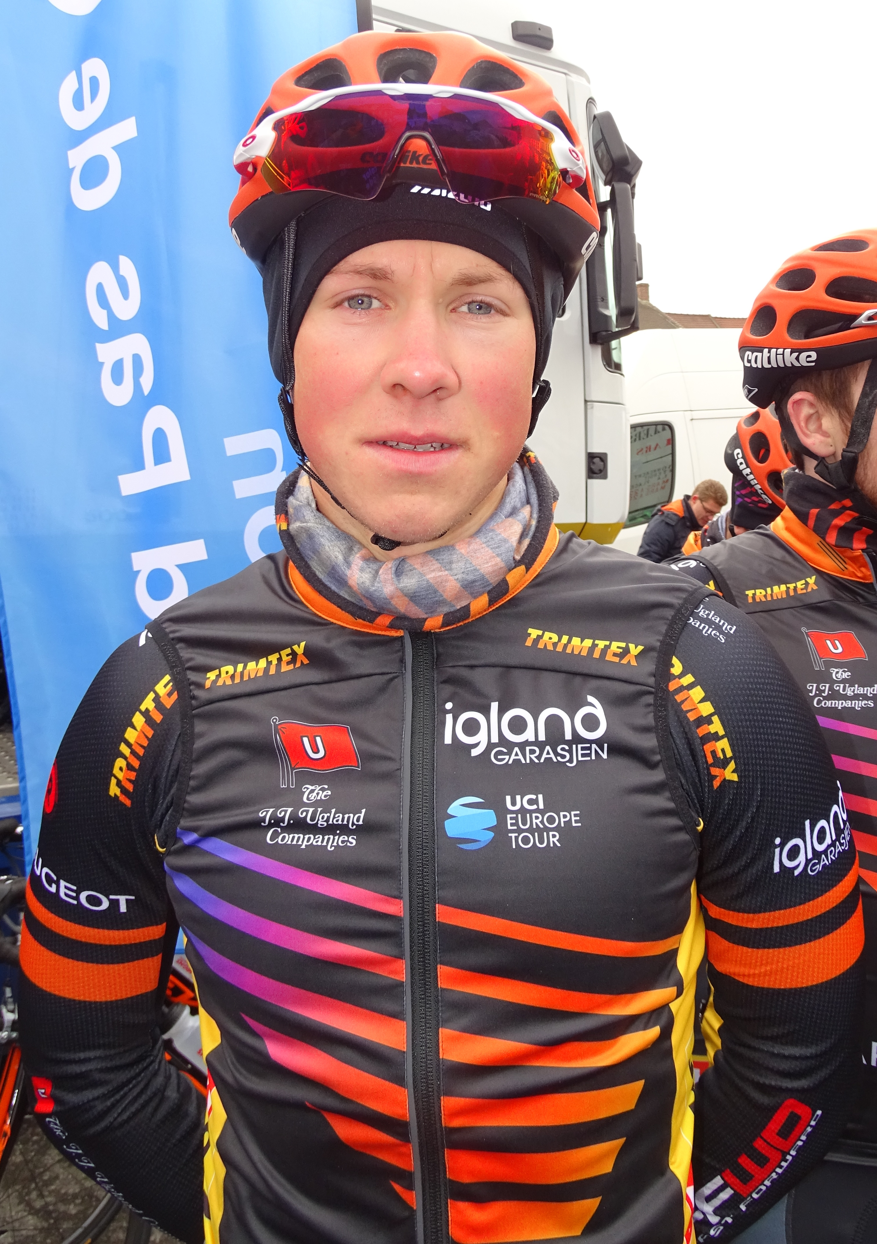 Reportage réalisé le dimanche 6 mars à l'occasion du départ et de l'arrivée du Grand Prix de Lillers-Souvenir Bruno Comini 2016 à Lillers, Pas-de-Calais, Nord-Pas-de-Calais, France.